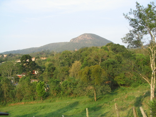 Anhangava - PR Brasil